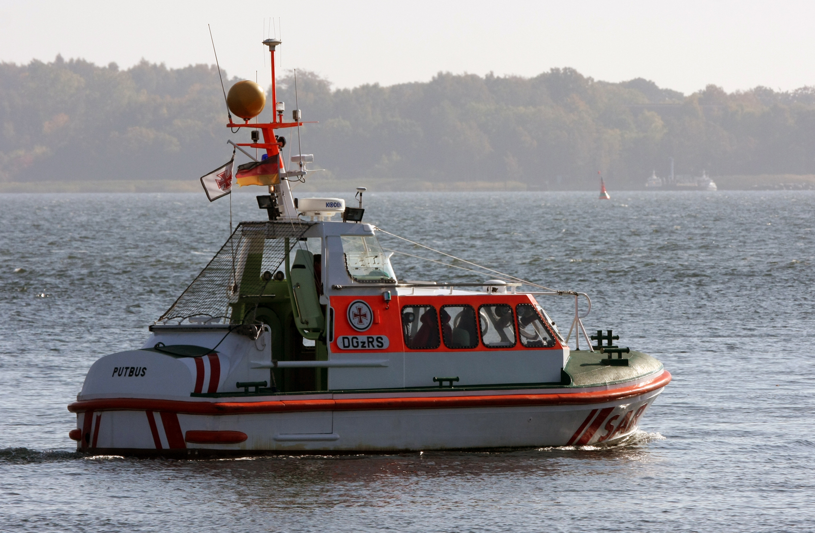 SRB Putbus auslaufend Lauterbach